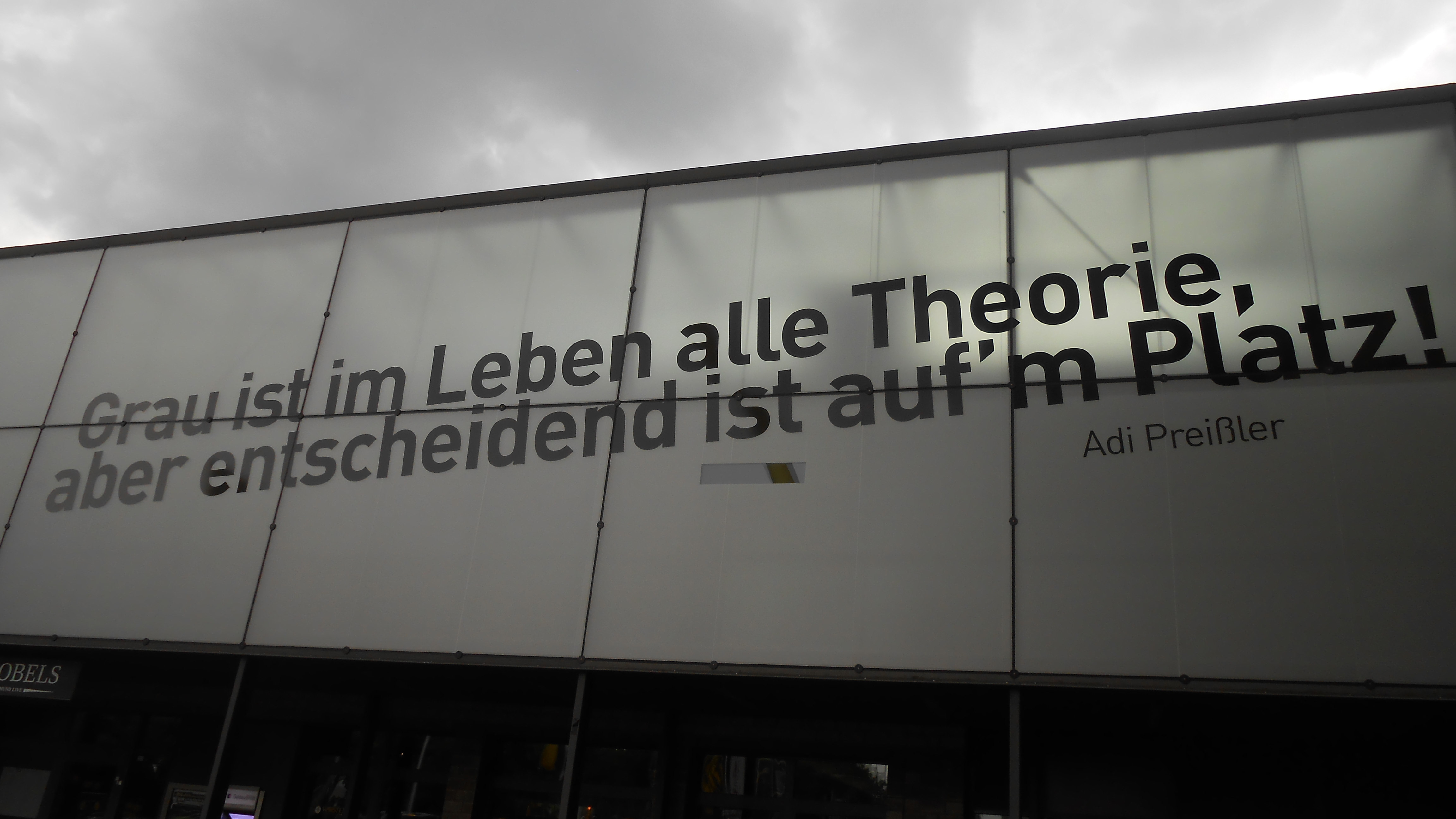 Das bekannte Adi Preißler-Zitat am August-Lenz-haus neben dem Westfalenstadion (aktuell Signal-Iduna-Park).